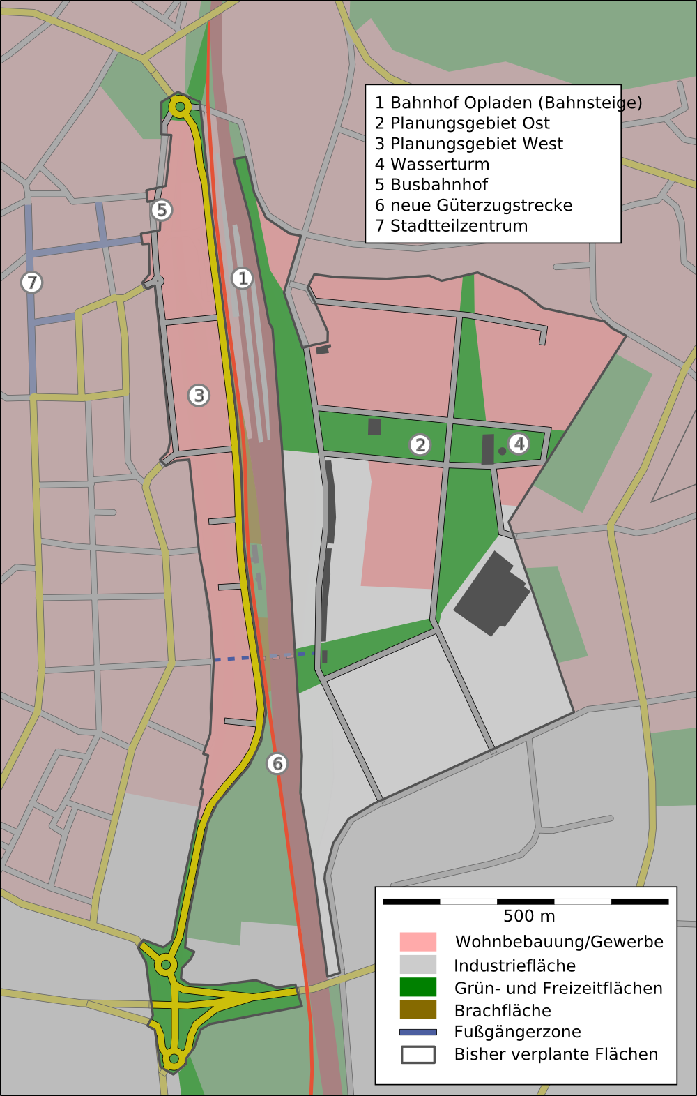 Übersichtskarte Neue Bahnstadt Opladen, Planungen. Die "Neue Bahnstadt Opladen" ist ein Projekt zur Nutzung ehemaligen Bahngeländes in Leverkusen-Opladen.